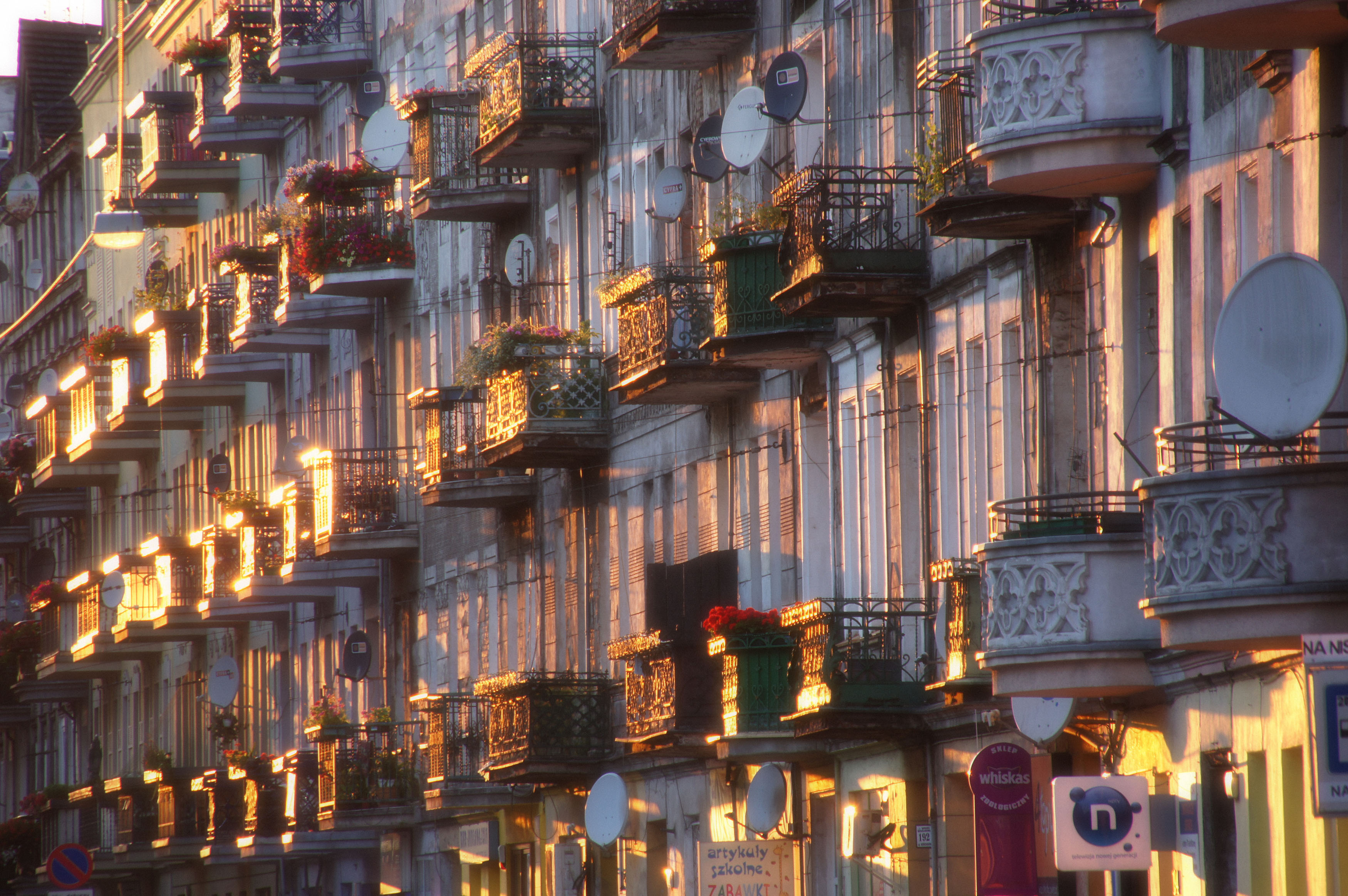 Historyczny układ urbanistyczny Przedmieścia Oławskiego, dzielnicy Wrocławia